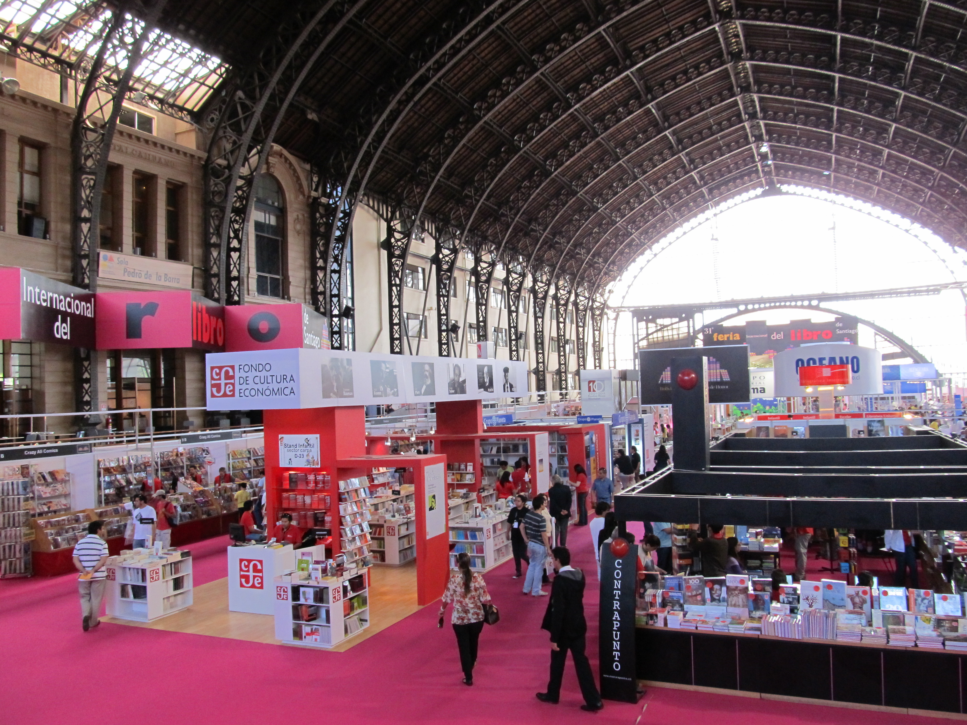 Feria Internacional del Libro de Santiago 2011.